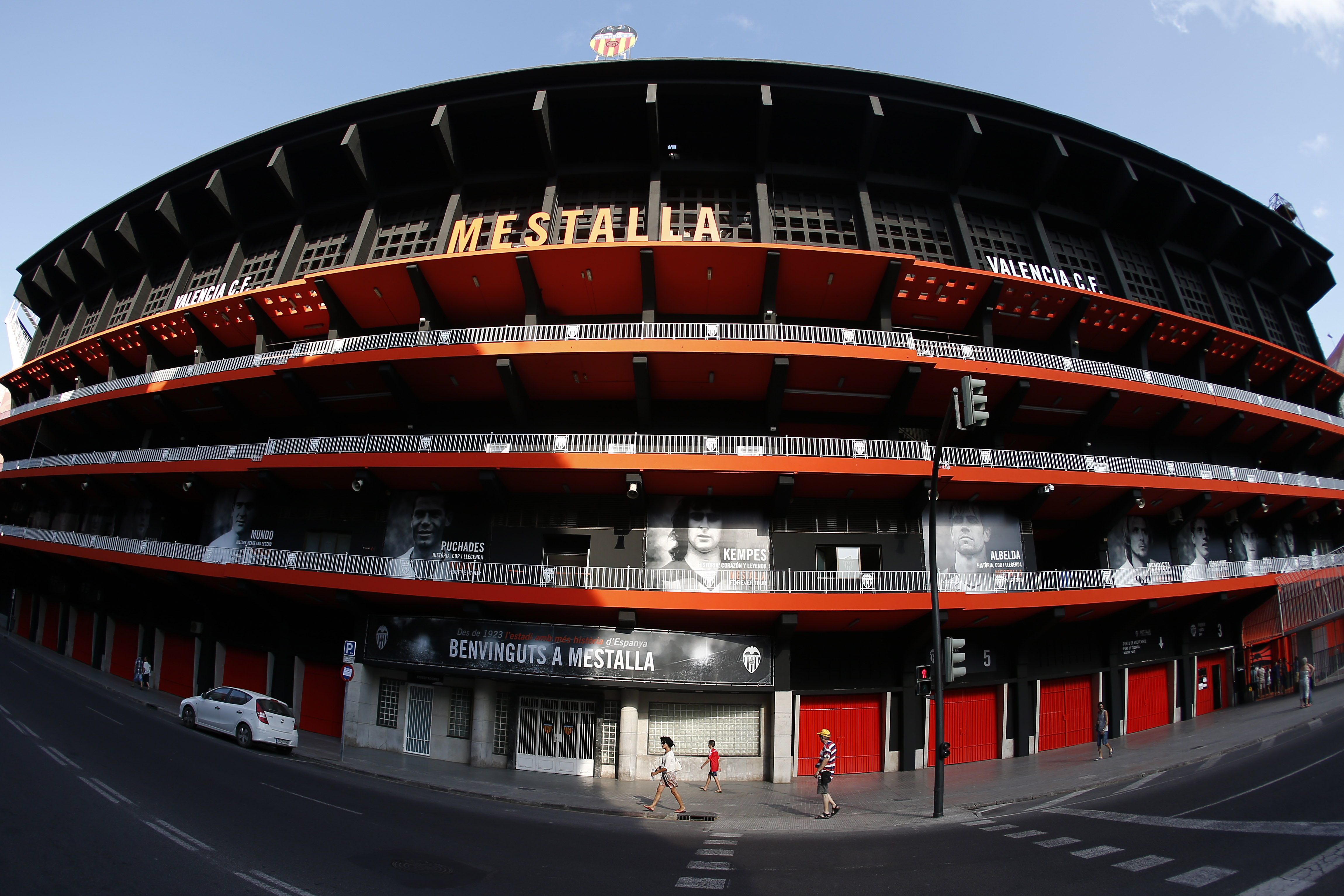 En la temporada 2014.15 Camp de Mestalla cambió radicalmente su aspecto.